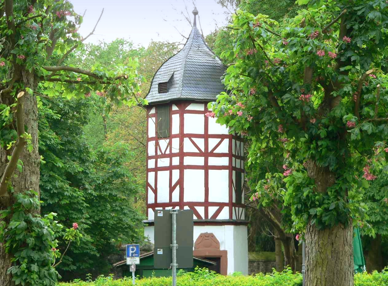 Treppenturm der ehem. Schmiede Kloster Arnsburg bei Lich, Hessen, Germany